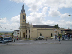 Igreja Nossa Senhora da Piedade, Arara, Paraíba.